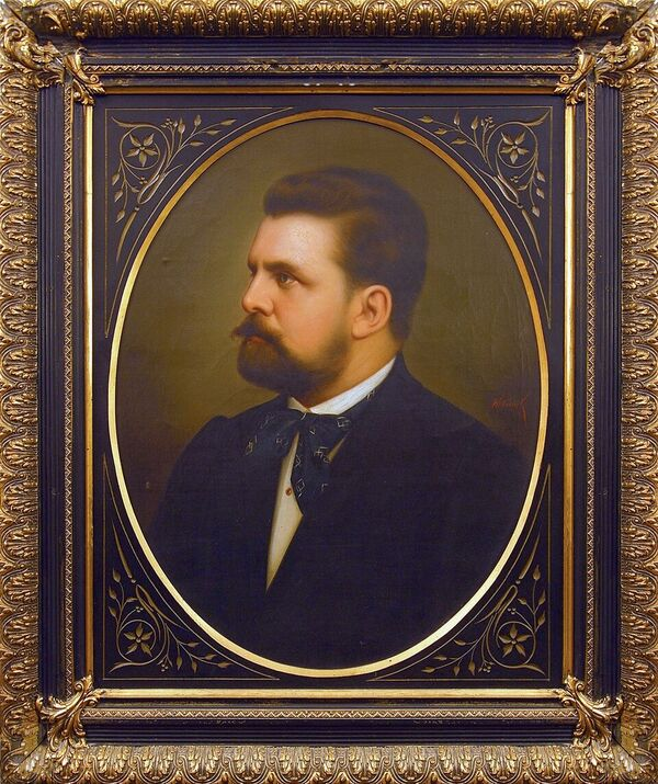 Carl Richter Senior